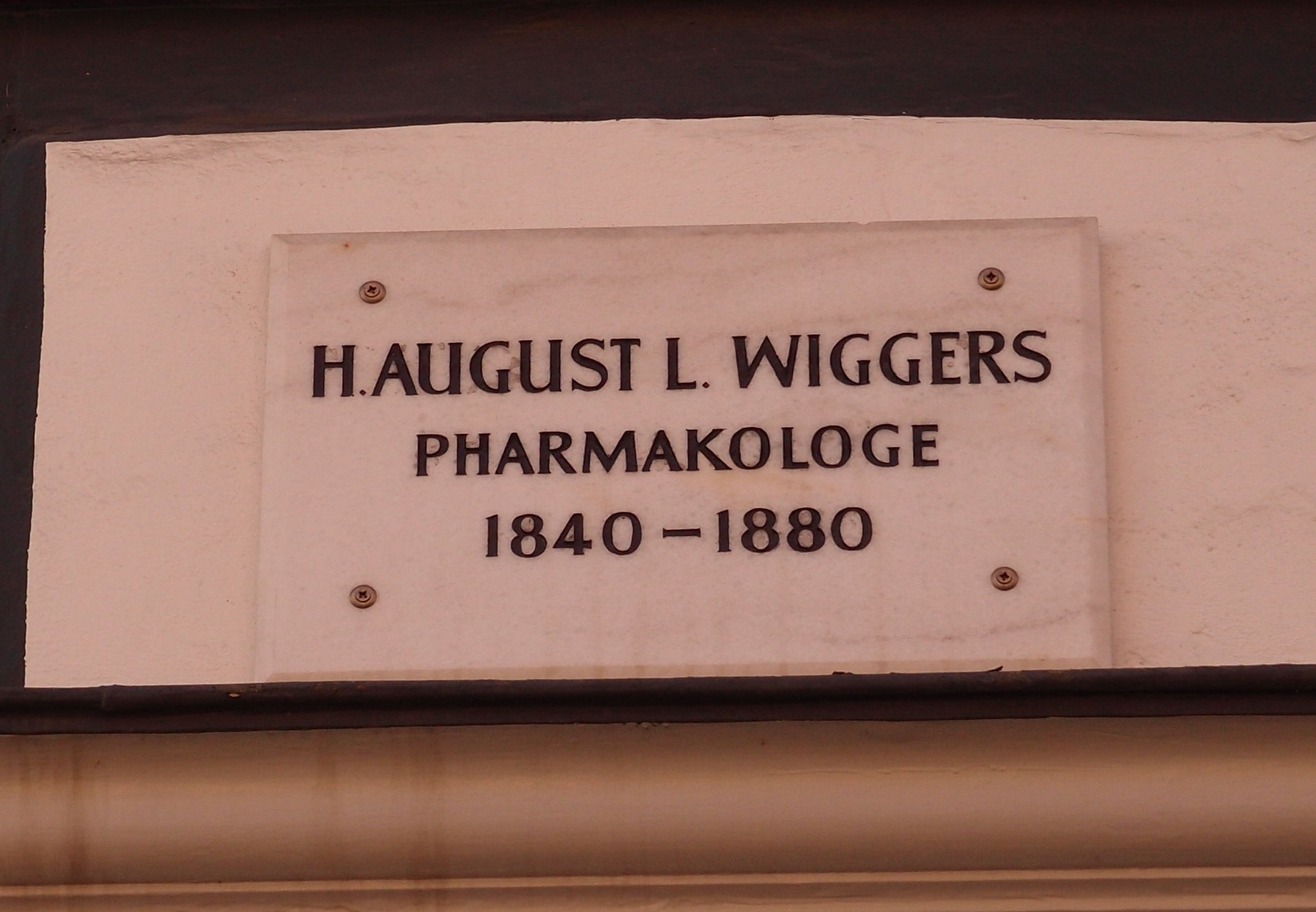 Tafel zur Erinnerung an den Pharmakologen und Botaniker Heinrich Ludwig August Wiggers (1803-1880) an dessen Wohnhaus in Göttingen, Kurze Straße 17